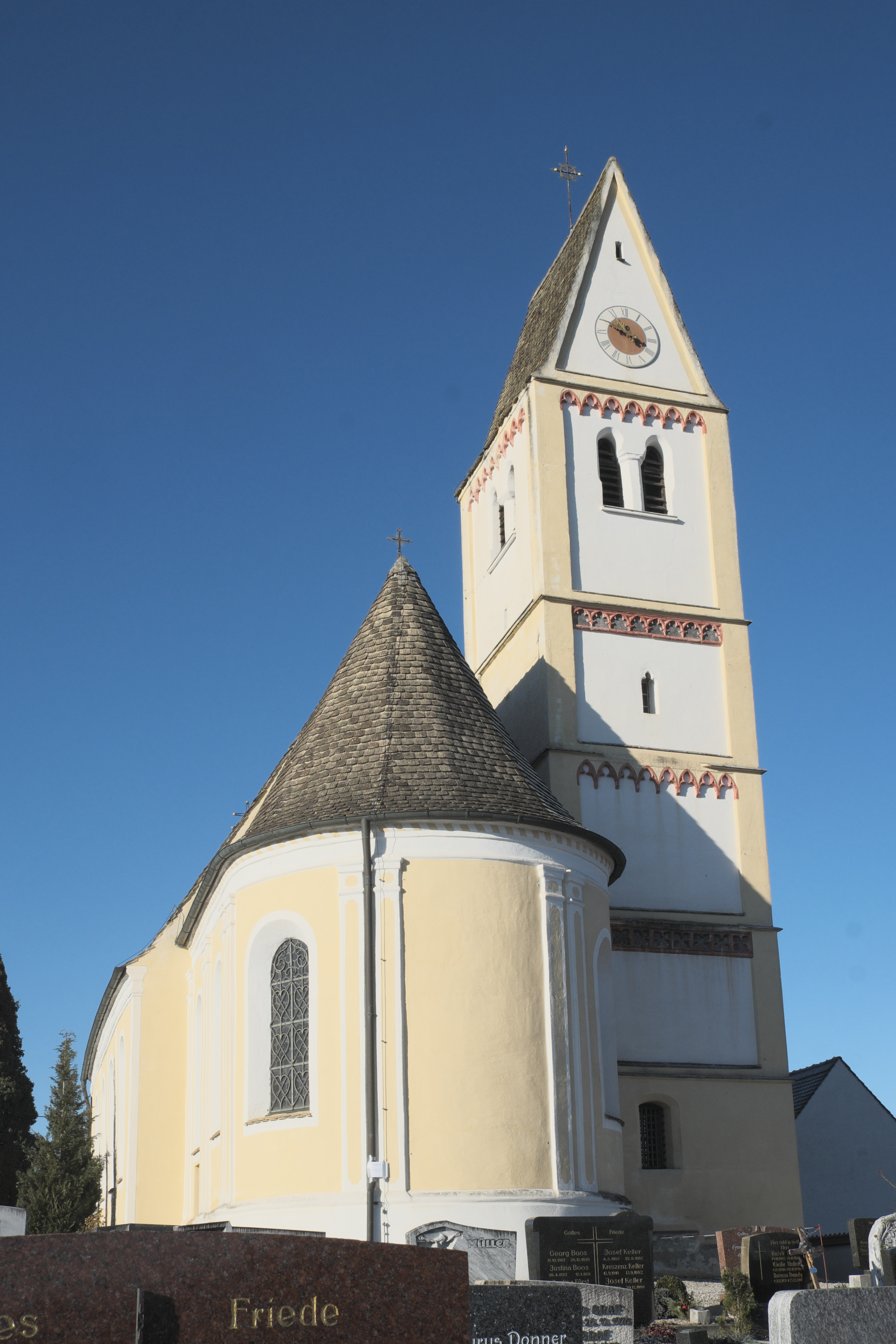 Katholische Pfarrkirche Heilig Kreuz in Oberfinning (Finning) im oberbayerischen Landkreis Landsberg am Lech (Bayern/Deutschland)